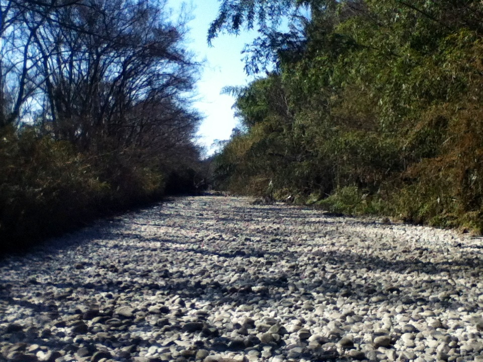 日照りにより渇水した川